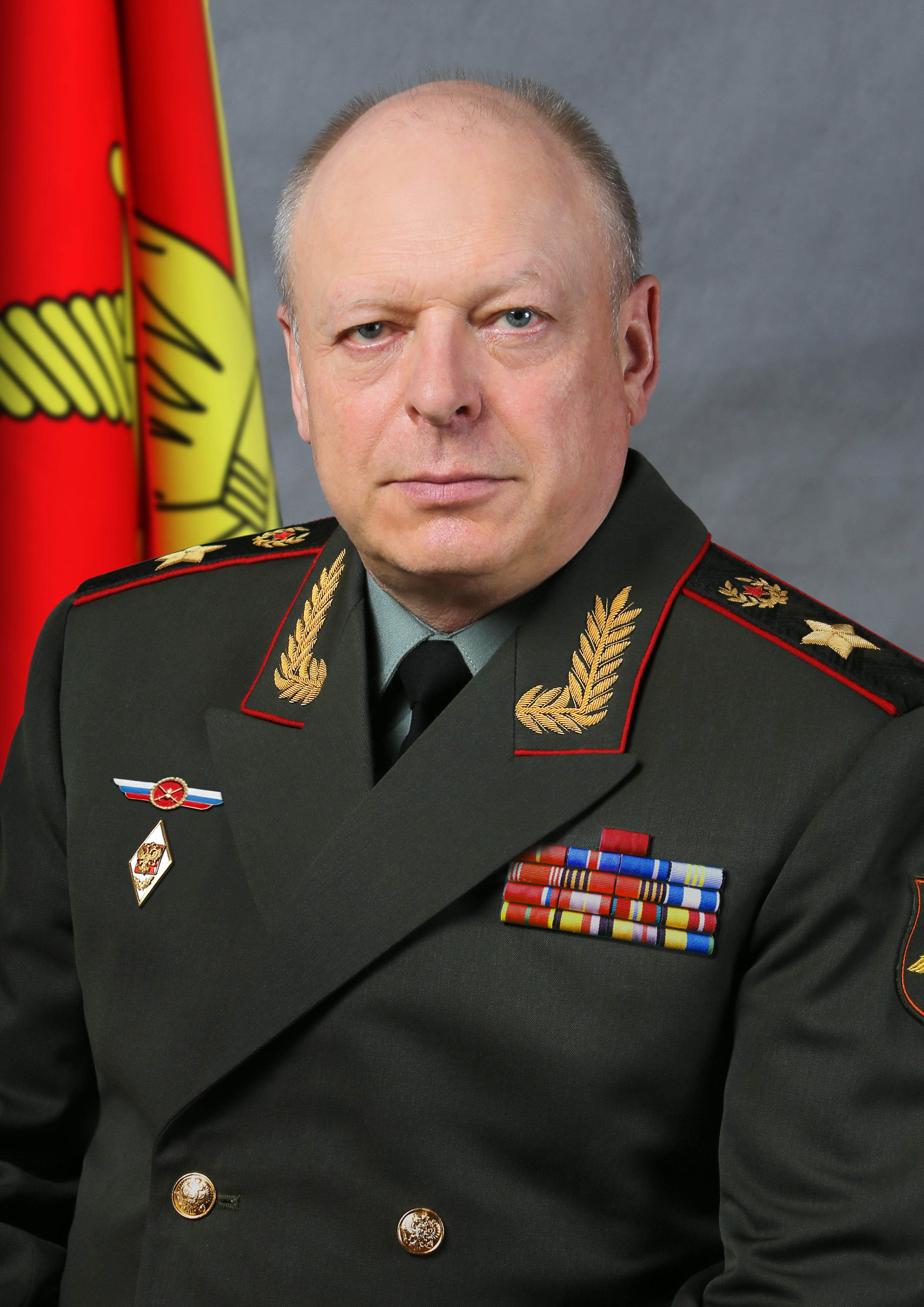 Главнокомандующий Сухопутными войсками генерал-полковник Салюков Олег Леонидович